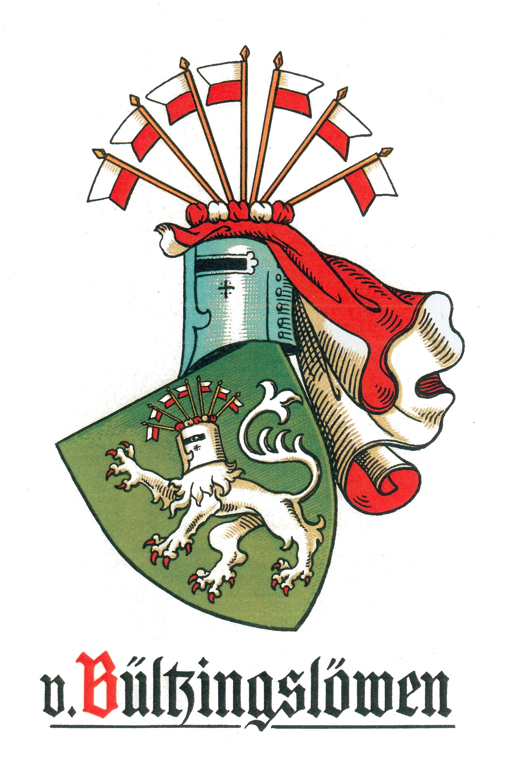 Wappen derer von Bültzingslöwen (Thüringer Uradel)